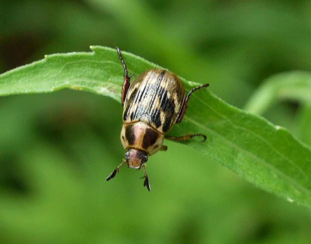 Anomala orientalis：セマダラコガネ 2008/07/29 和歌山県田辺市：Tanabe City. Wakayama Pref. Japan